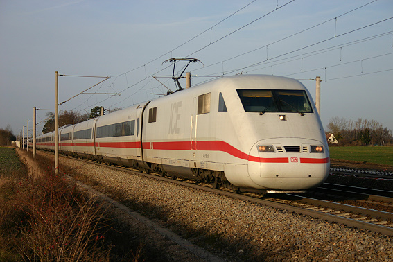 ICE 1 in Augsburg-Hochzoll